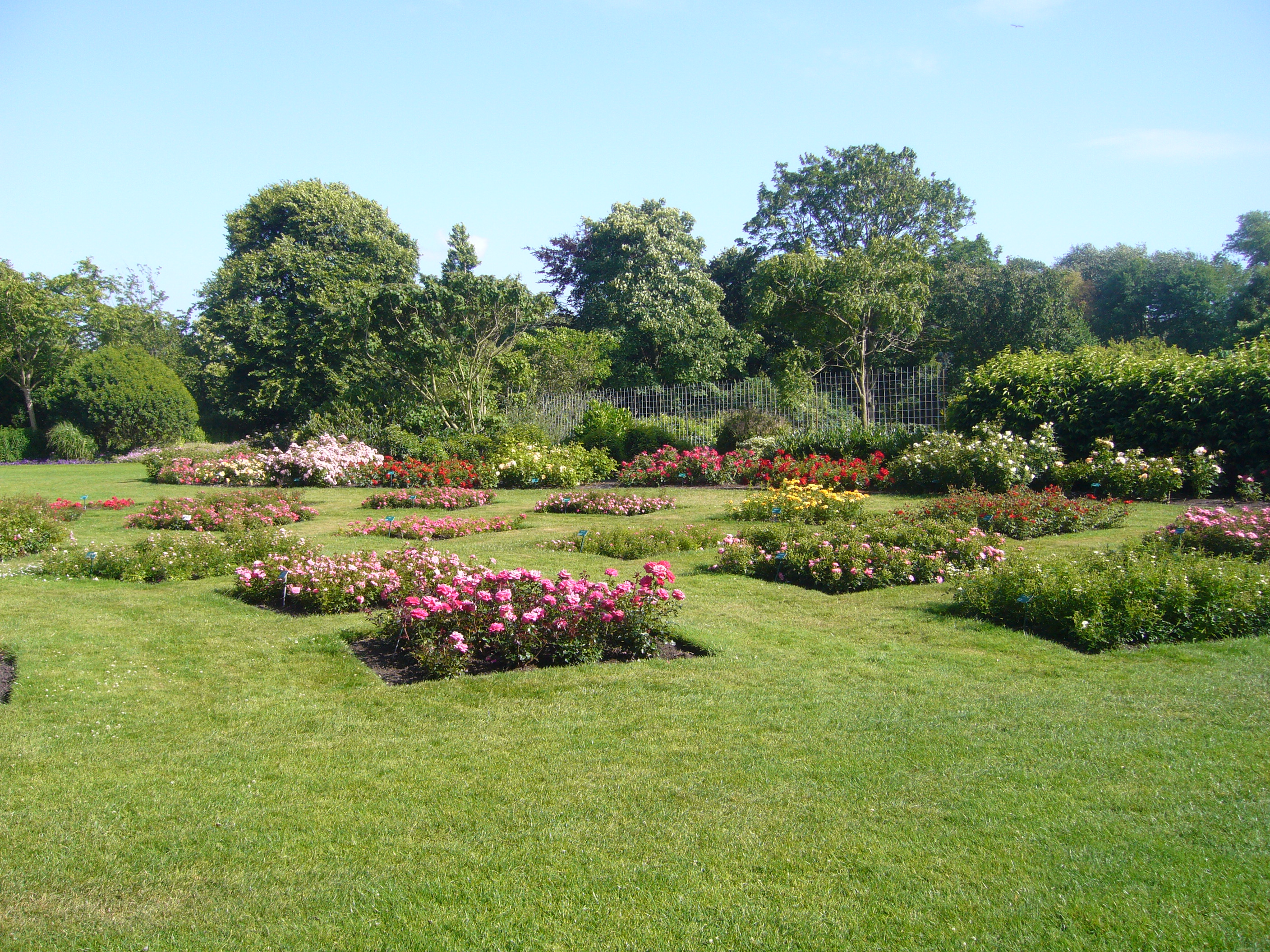 Westbroekpark, rozententoonstelling